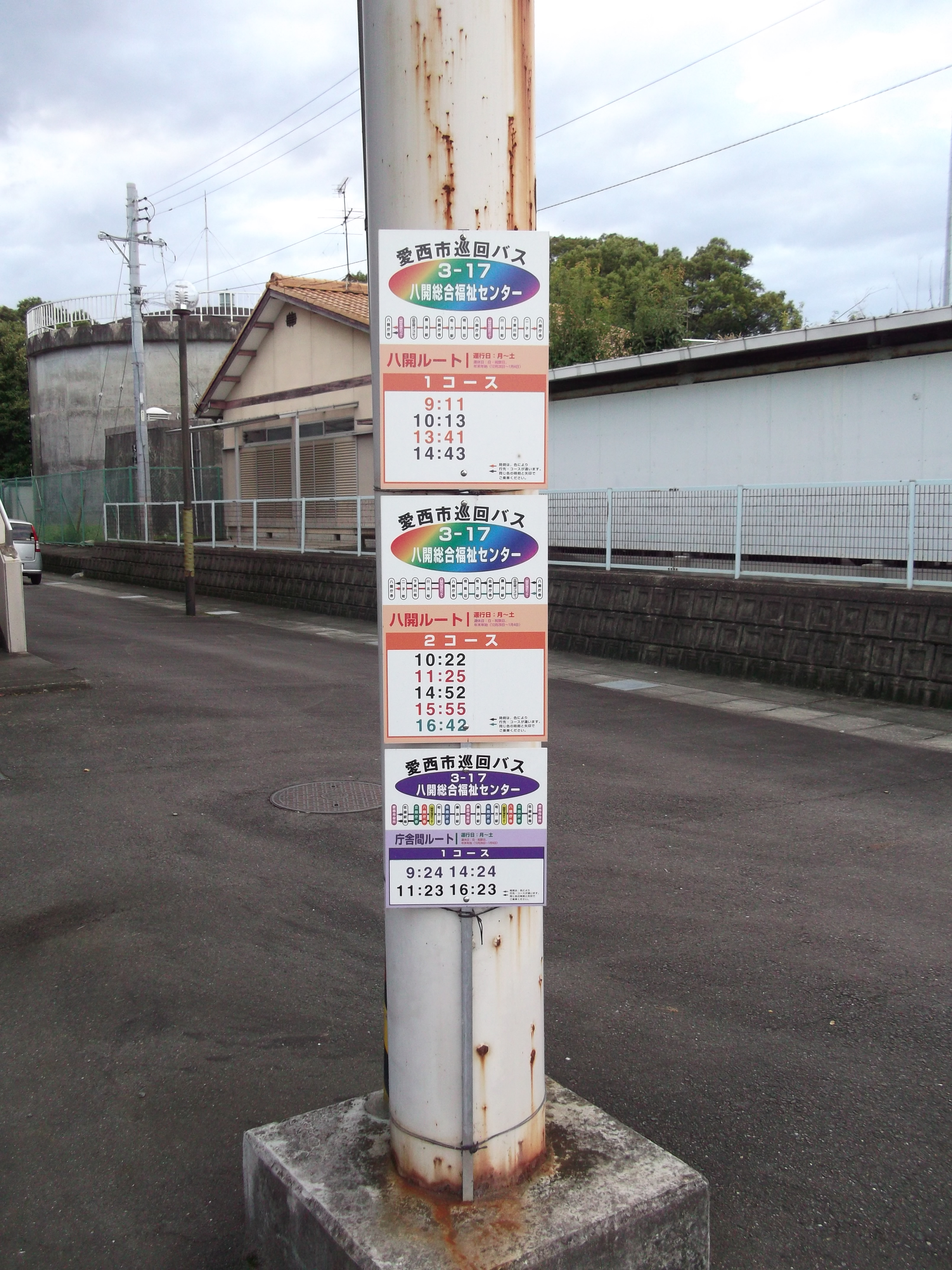 愛西市江西町の愛西市巡回バス「八開総合福祉センター」停留所を東側公道南側より撮影